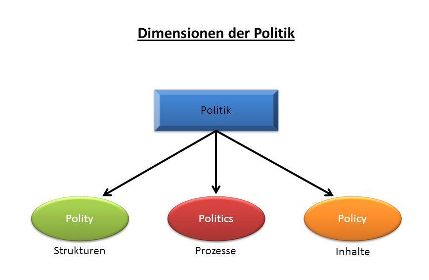 Dimensionen der Politik